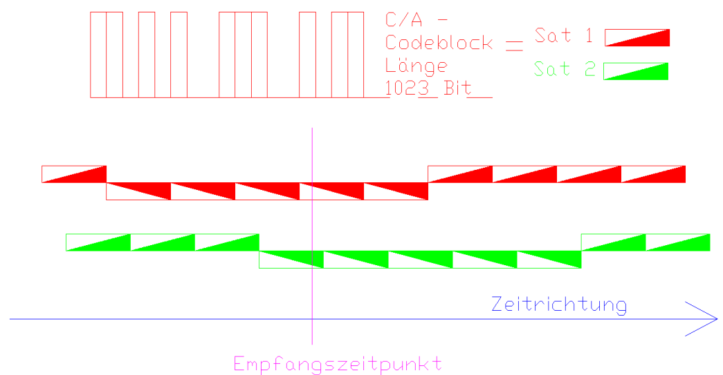 Prinzipille Bestimmung der Sendezeitpunkte der GPS-Satelliten im GPS-Empfänger